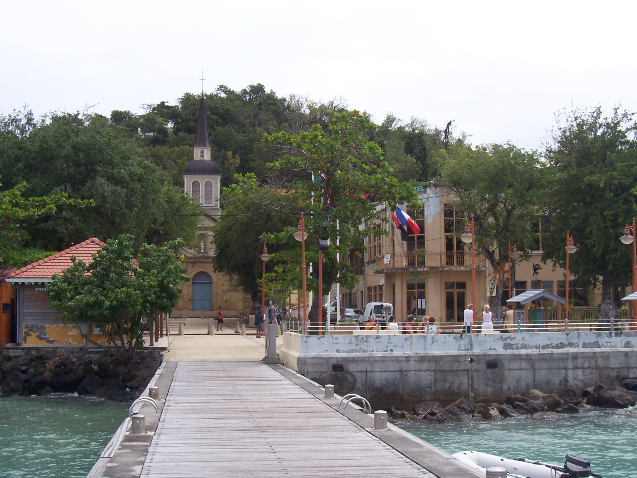 Sainte Anne (Martinique) église et mairie